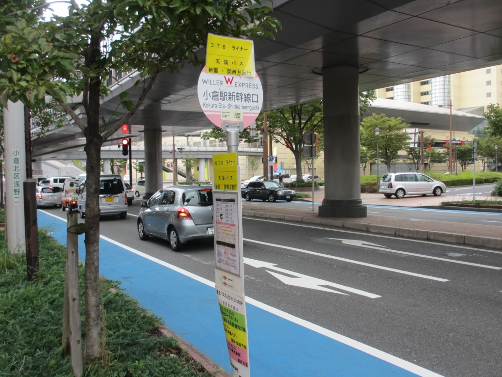 小倉駅新幹線口バス停